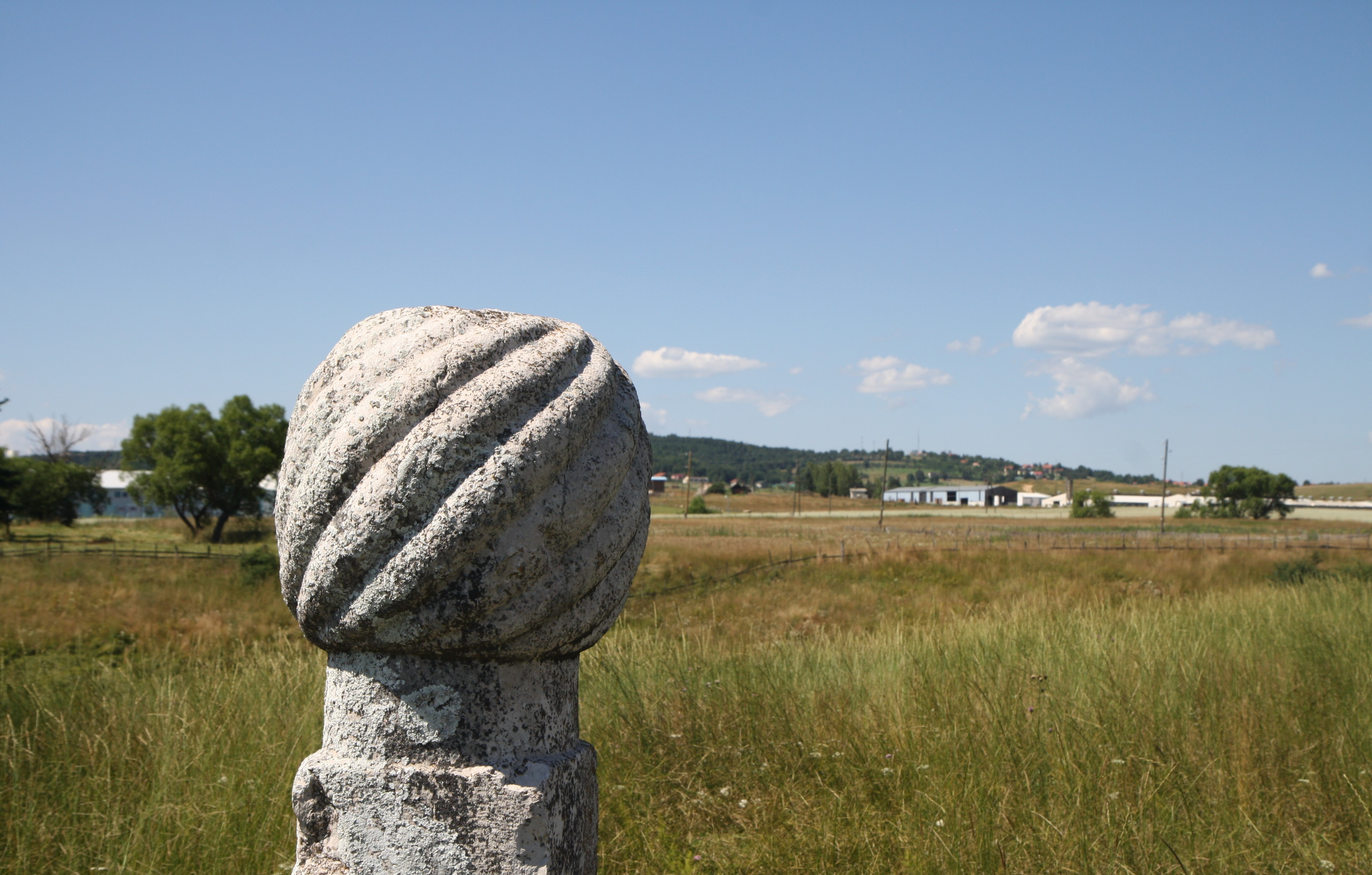 Српски (ћирилица): Јахја ефендијино турбе, Бјелосављевићи This image was uploaded as part of Trace of Soul 2016.